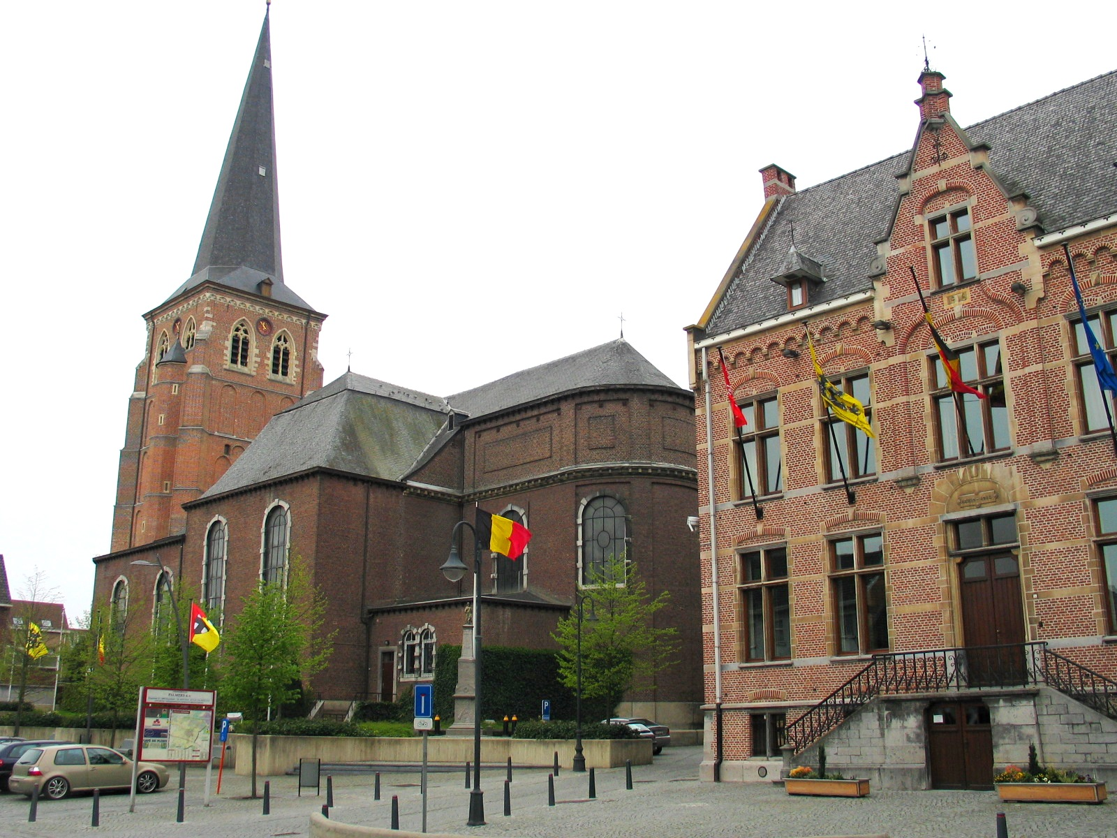 Sint-Servatiuskerk en gemeentehuis van Diepenbeek - eigen foto